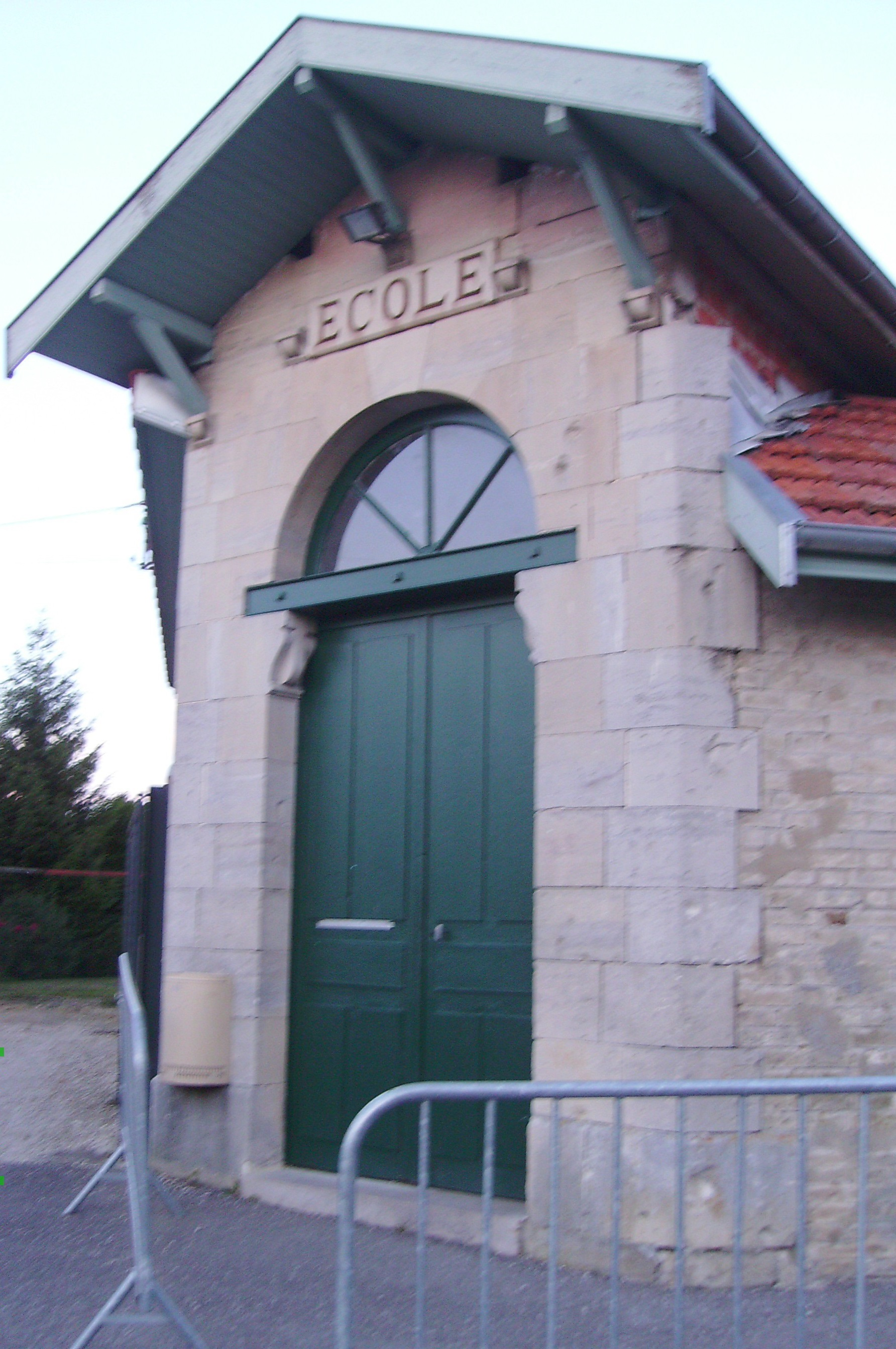 Ecole de Courdemanges